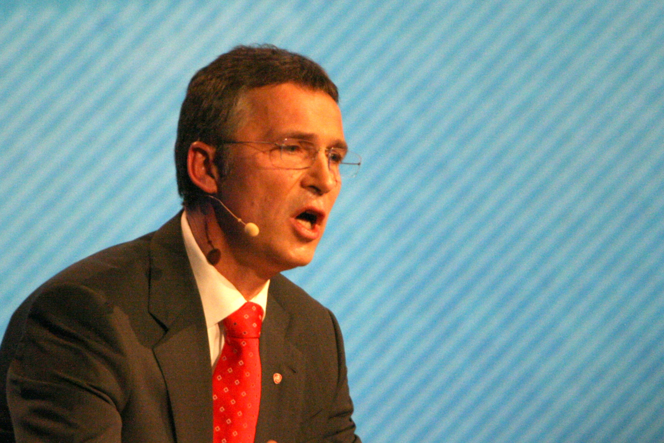 Jens Stoltenberg, statsminister i Norge. Fra NHOs Årskonferanse 2009.